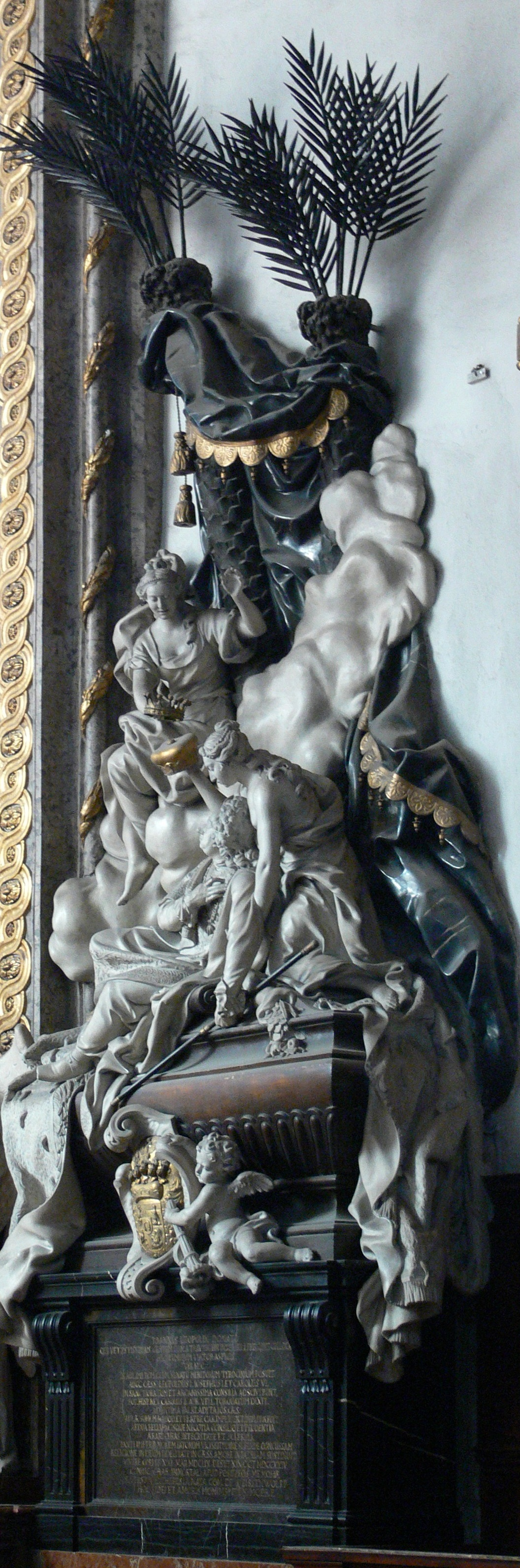 Wien Michaelerkirche - Epitaph Johann Leopold Donat Fürst von Trautson († 1724)